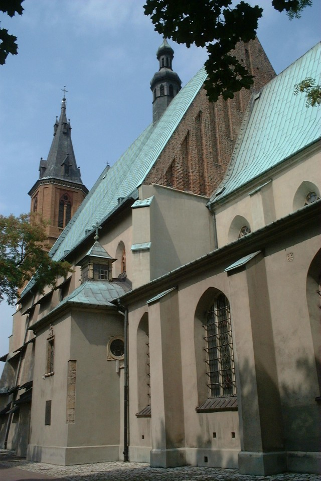 Poland, Olkusz - church.